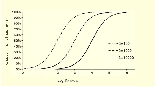 La récupération théorique en fonction du log du coefficient de distribution à différents ratios de phase.